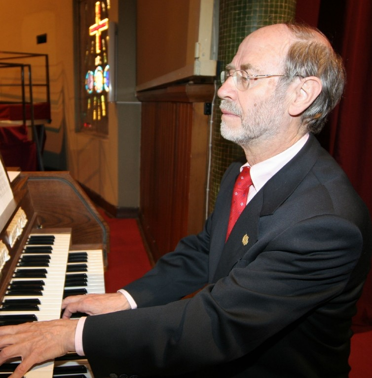 Sabin Salaberri (Musikaste 2005)